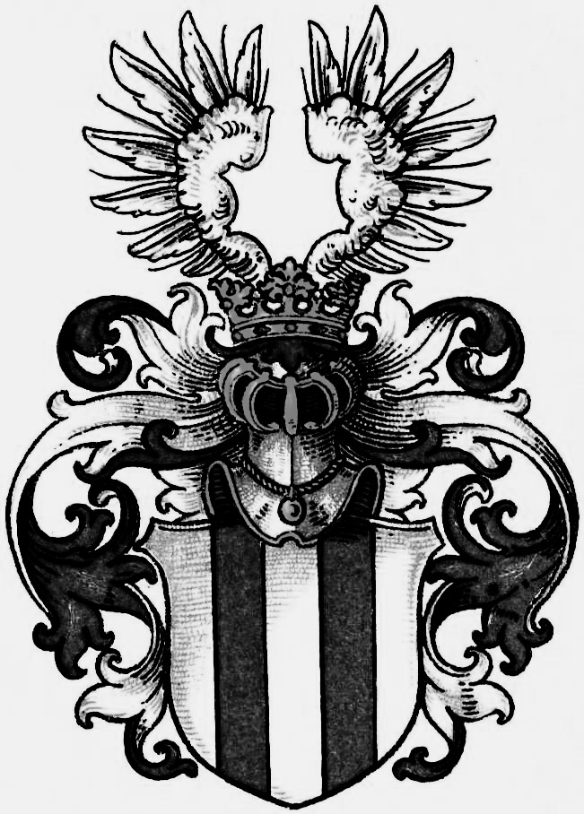 Wappen des westfälischen Adelsgeschlechts von Wittgenstein (Variante der Kölner Patrizier), ähnlich dem mittelalterlichen Hochadelsgeschlecht der Grafen von Wittgenstein